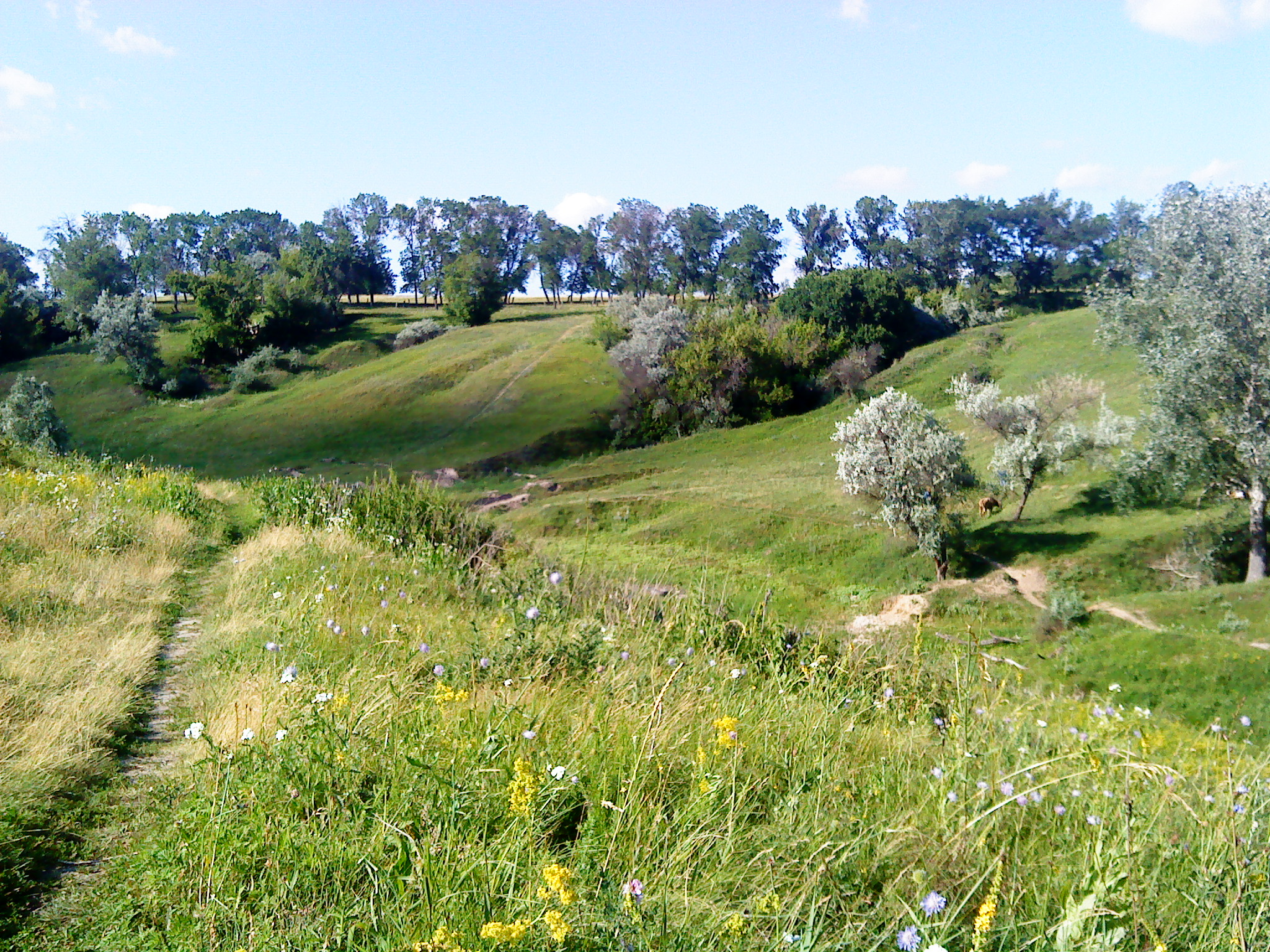 Вид на яр з боку Покотилівки